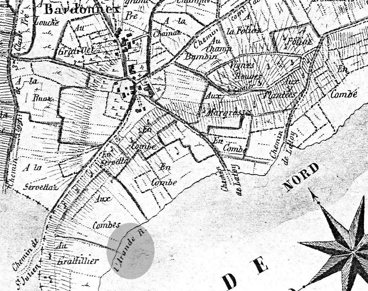 Ancienne commune de Compesières dans le canton de Genève, détail de la carte « Mayer » de 1830. Détail avec mention du ruisseau « L'Arande », ici mis en évidence. Voir l'atlas en ligne.